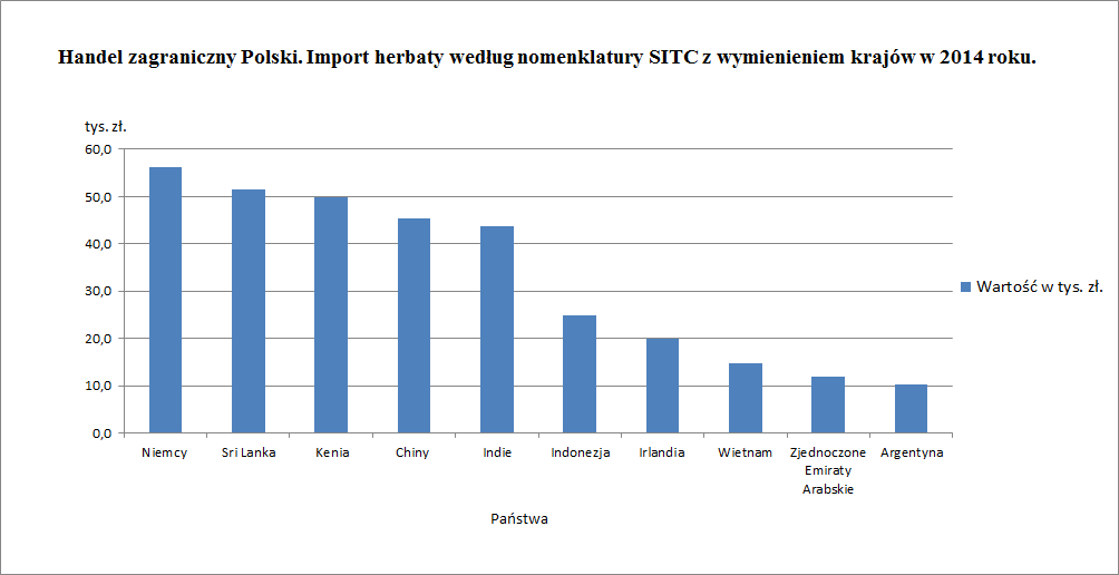 Źródło: Rocznik Statystyczny Handlu Zagranicznego 2015.